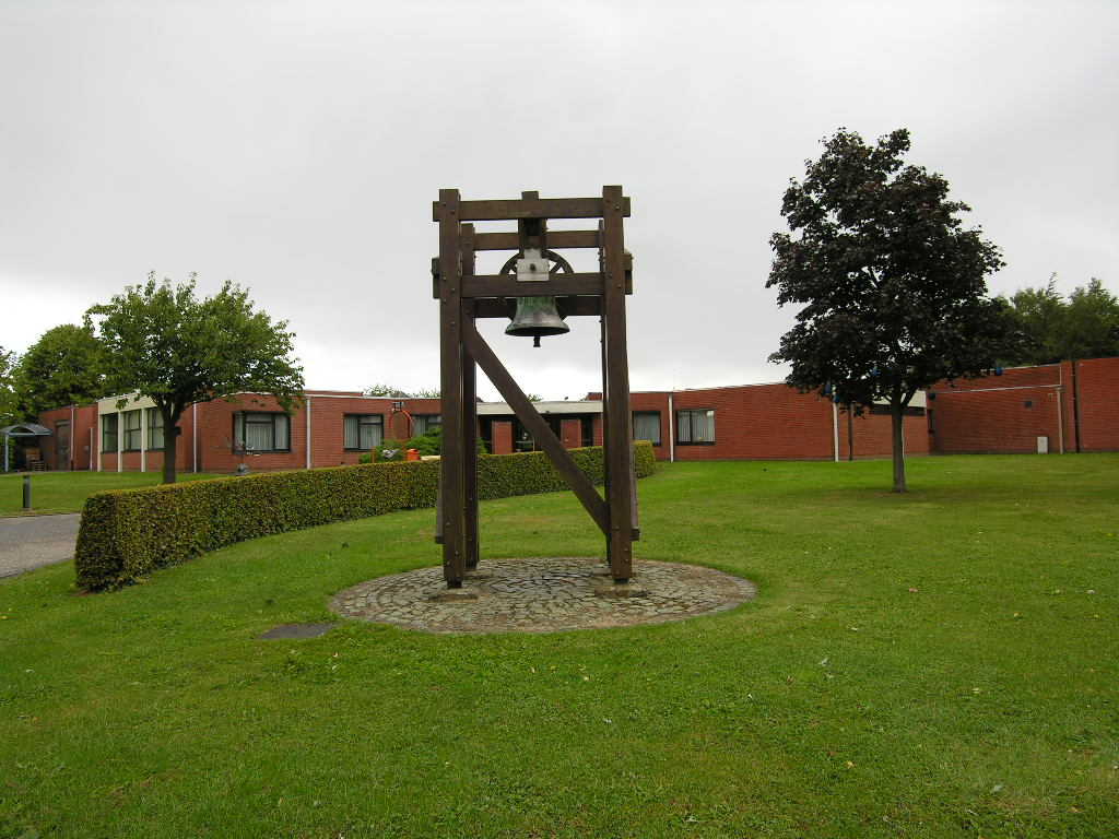 Ida Fourier, dochter van Bokkenrijders uit Wellen, hielp bij de bouw van de Psychiatrische Instelling Sancta Maria in Sint-Truiden (thans Melveren). Haar naam is gegraveerd in de kerkklok, die zij schonk aan de Zusters van Liefde in 1841.